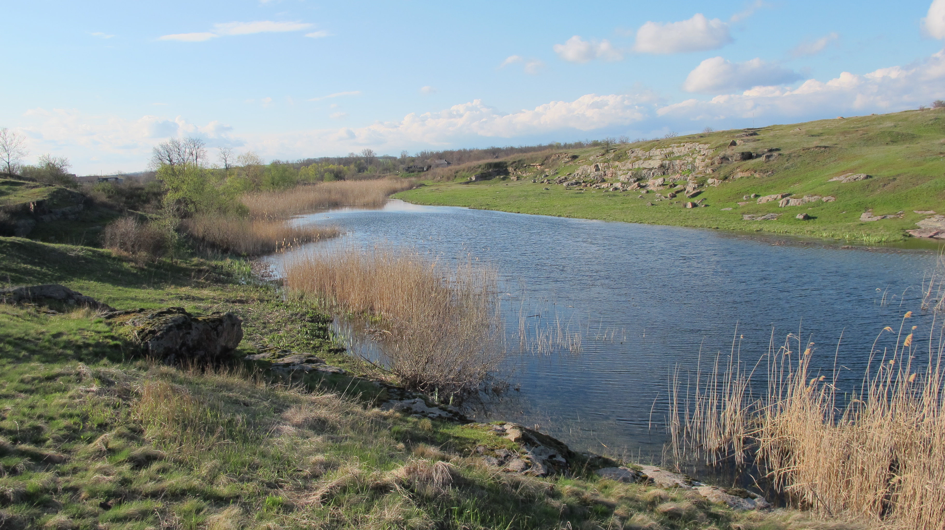 Річка близ с. Гурівка